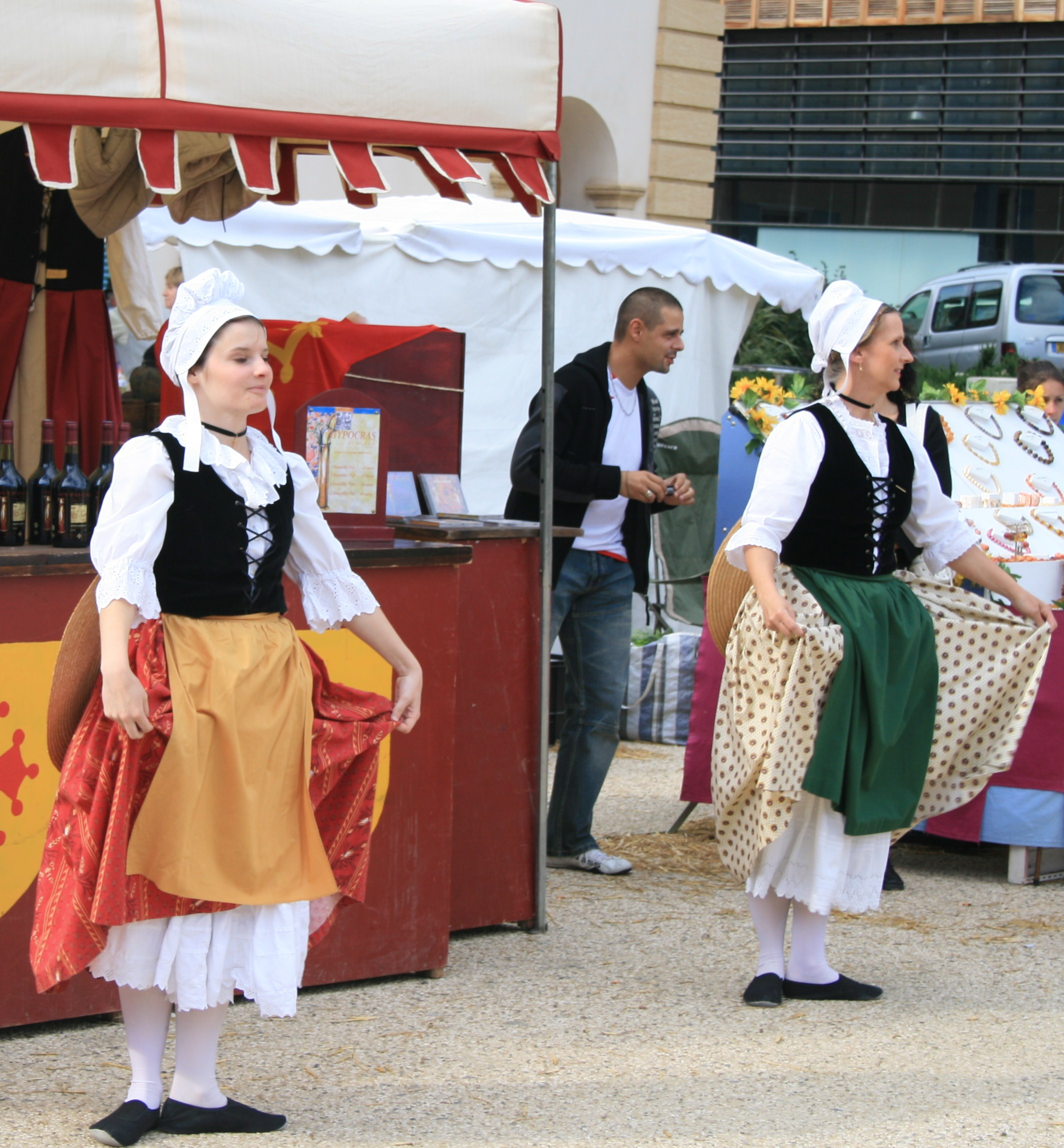 Le jupon comtadin